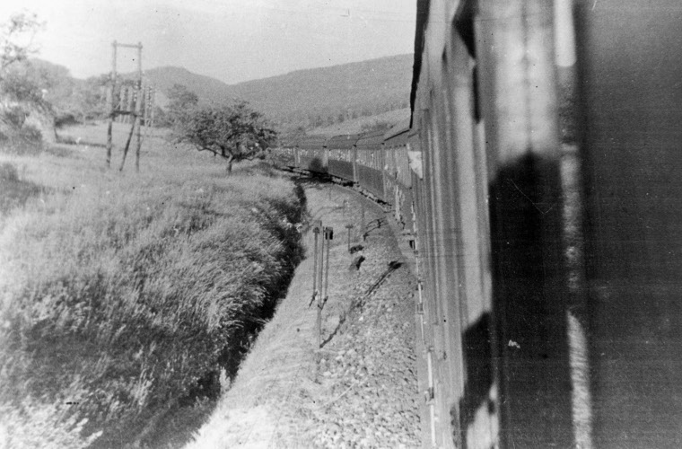 Una tradotta militare in viaggio verso la Russia